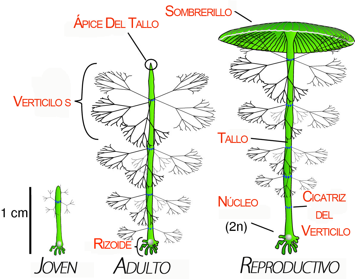 Partes de Acetabularia en Distintas Etapas